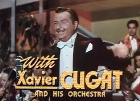 Imagem do trailer do filme "A Date with Judy". Os trailers dos filmes publicados antes de 1964 nos Estados Unidos são de domínio público.